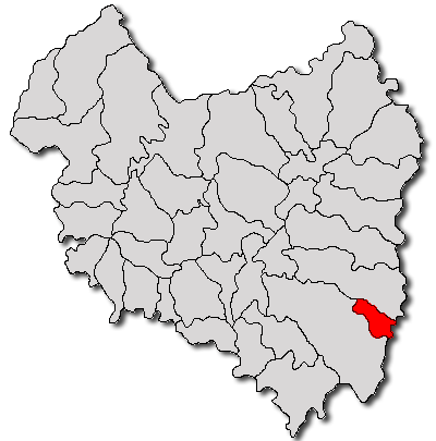 Categorie:Hărţi ale judeţului Covasna